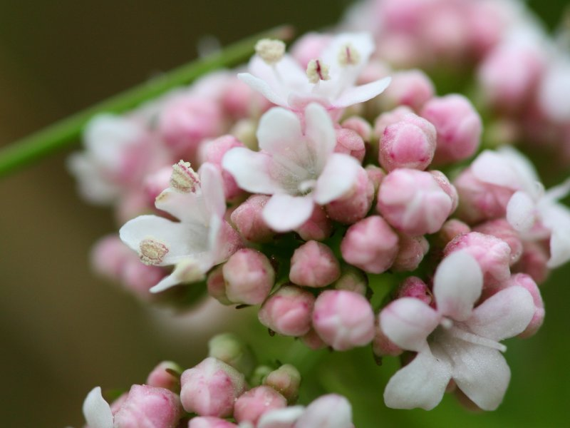 Kleiner Baldrian (Valeriana dioica), männliche Pflanze, Detail der Blüten